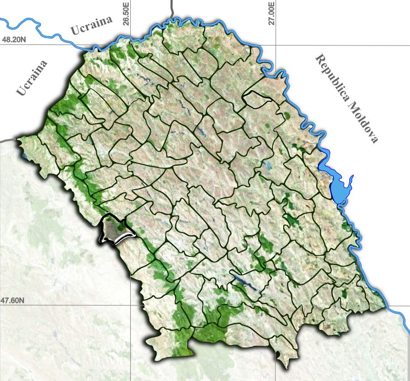 Bucecea jud Botosani.